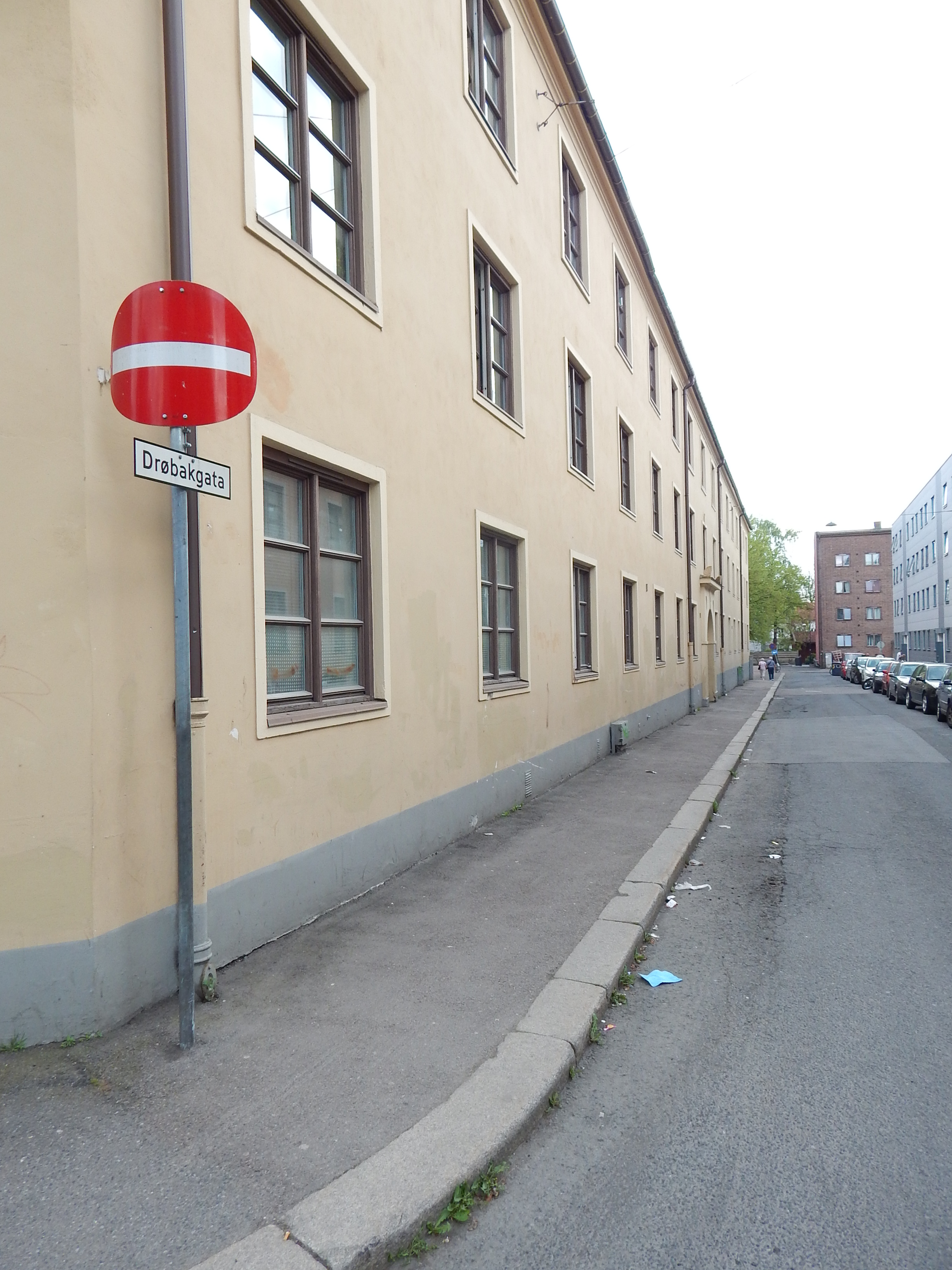 Drøbakgata